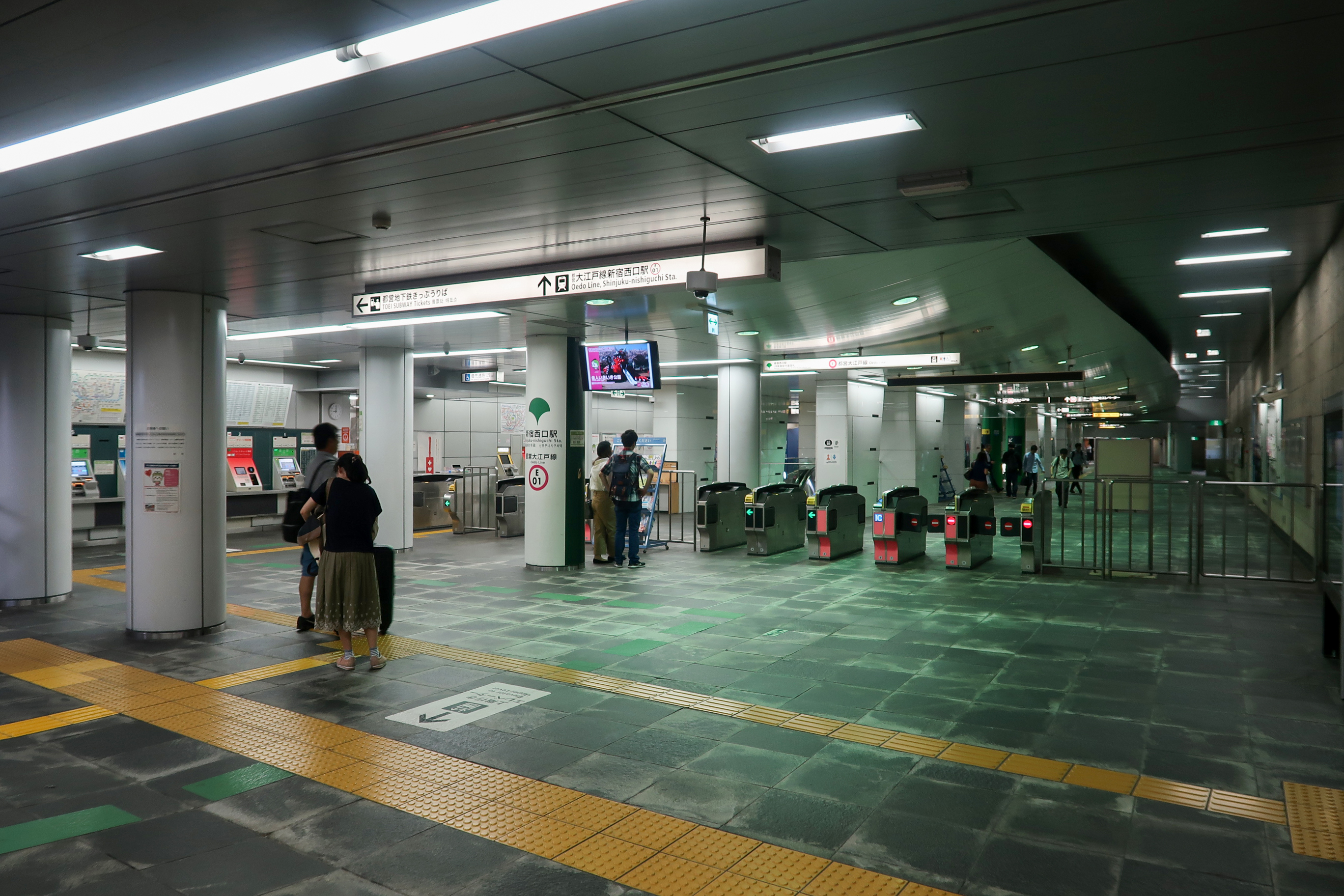 Shinjuku-Nishiguchi Station